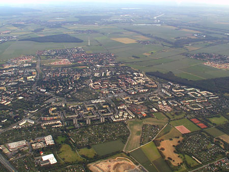 Luftbild der Weststadt, Braunschweig